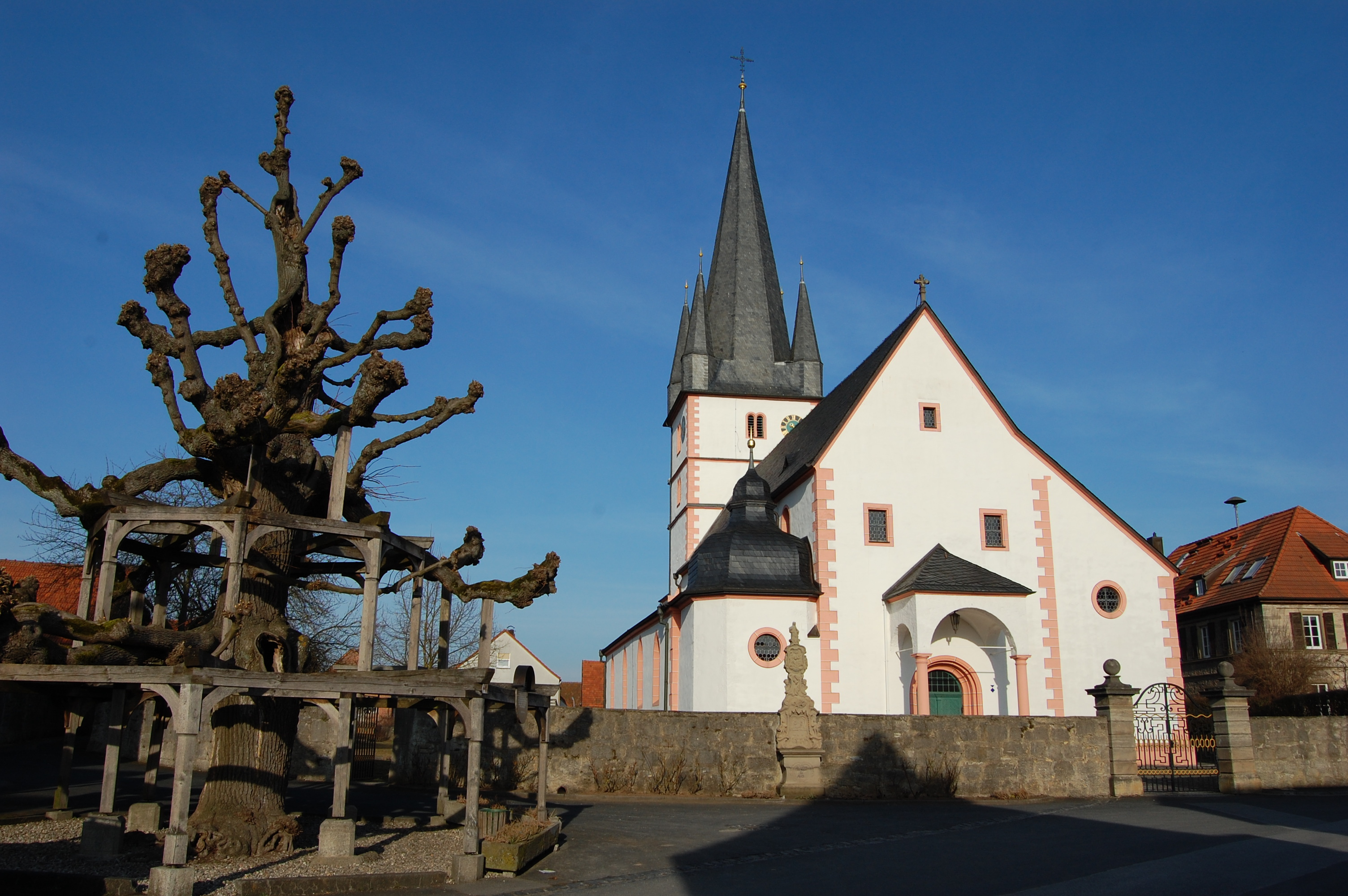 Salz, Pfarrkirche Mariä Himmelfahrt mit alter Dorflinde (2011)